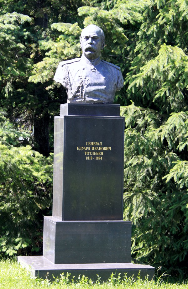 Памятник Тотлебену в г. Плевен (Плевна), Болгария